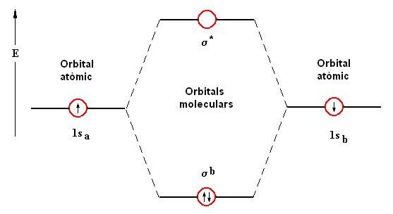 Diagrama del nivell d'energia de la molècula d'H2 formada a partir dels àtoms Ha i Hb